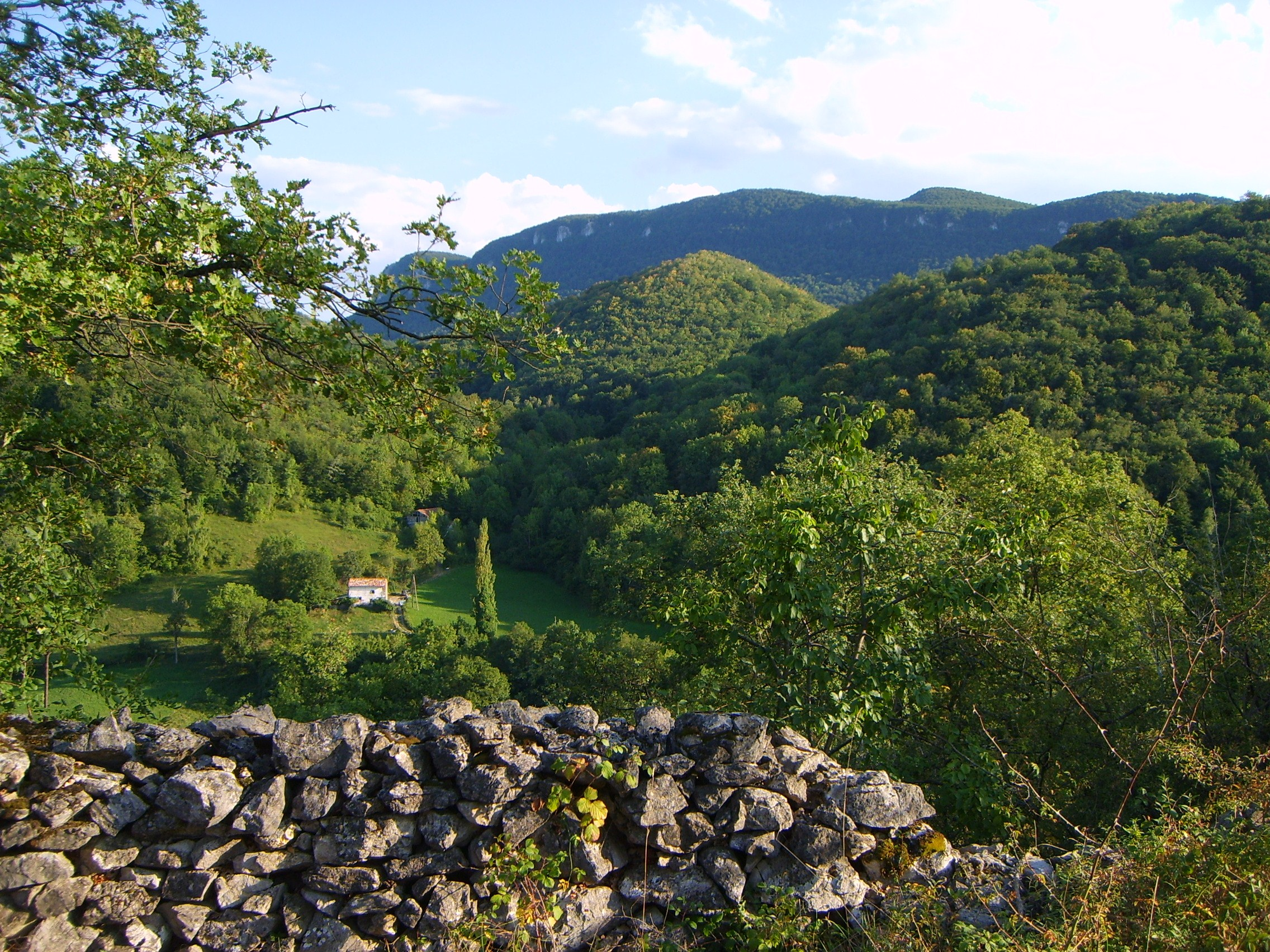 Saint-Girons (Ariège, France) : Parrat vu depuis le Sarrach, en arrière-plan Sourroque